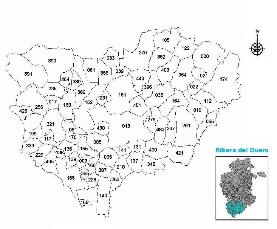 Municipios de la Ribera de Burgos (Burgos), ubicados y descritos con su código municipal según el INE.